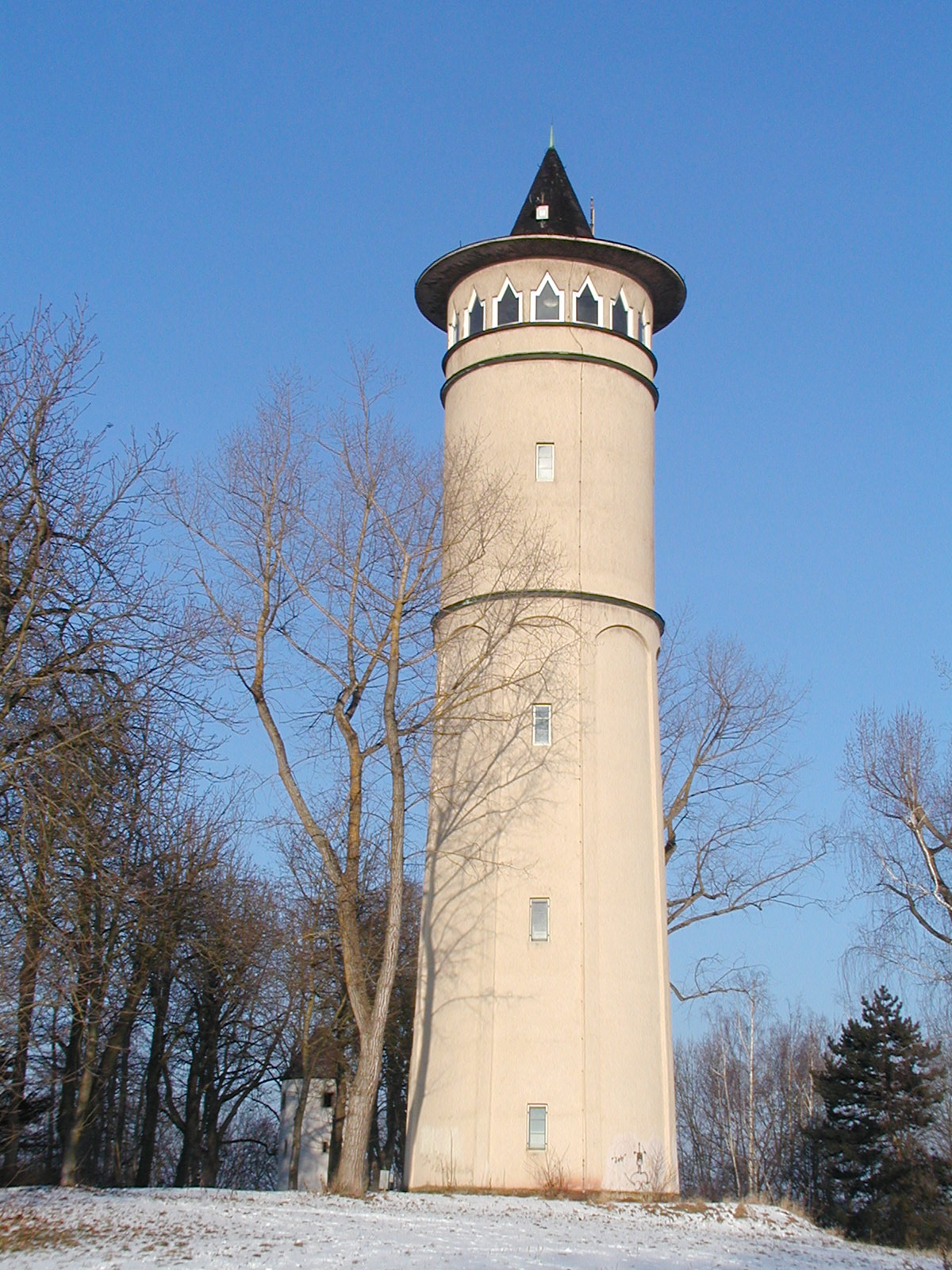 Der Wasserturm auf dem Engelberg (Engelbergturm)